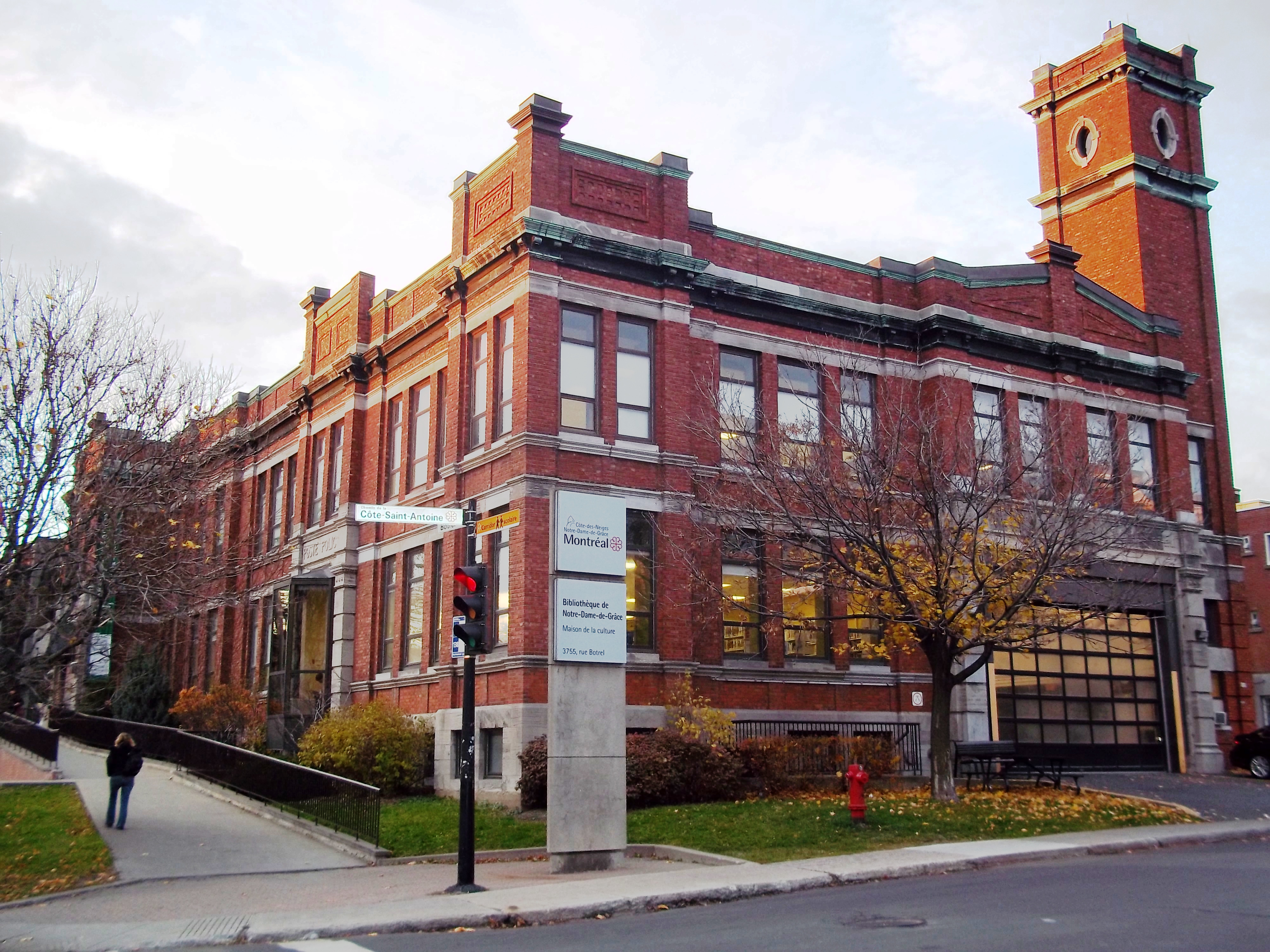 Maison de la culture, Bibliothèque de Notre-Dame-de-Grâce, 3755, rue Botrel, Montréal